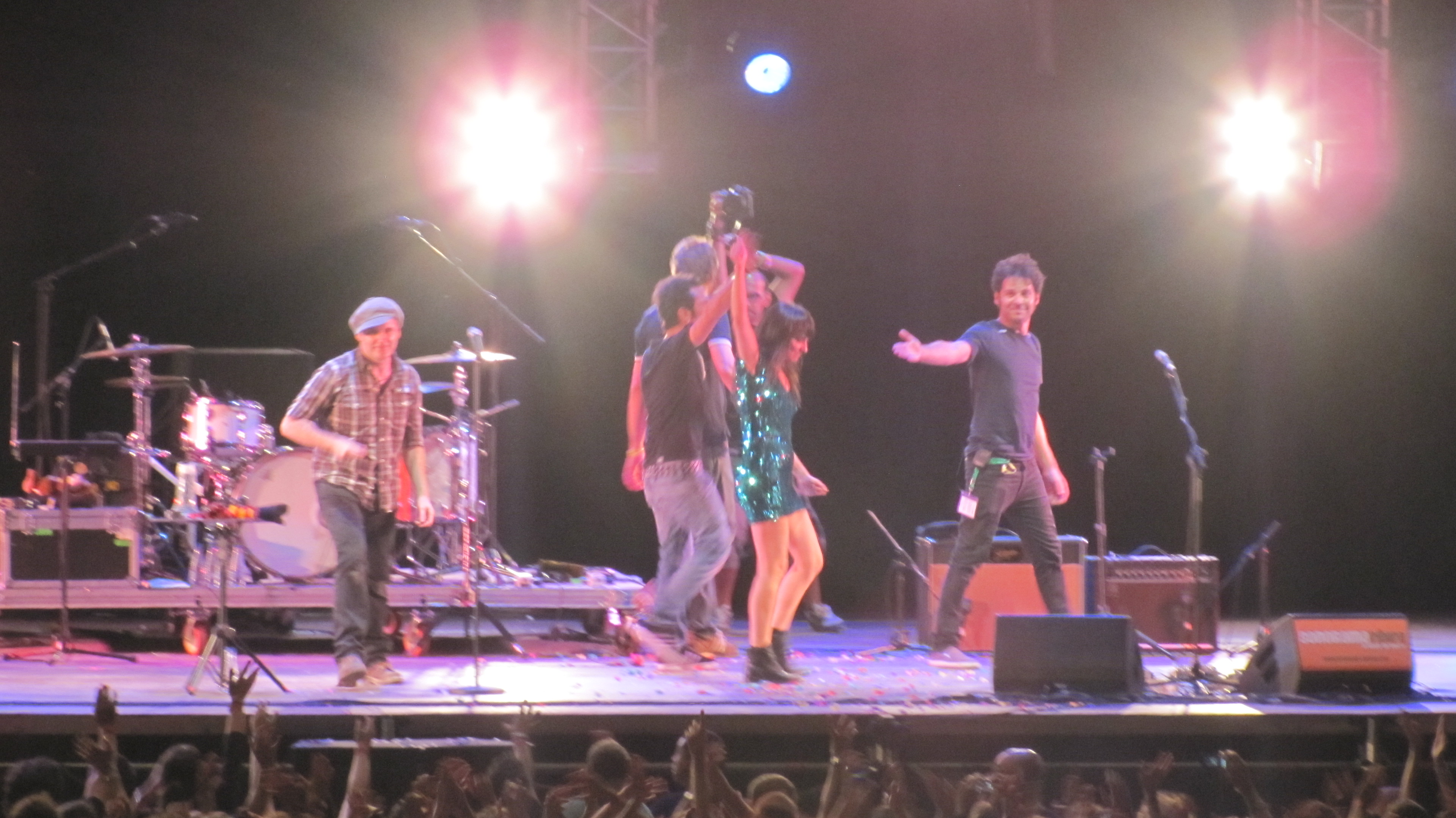 Amaral tras su concierto en el Festival Sonorama Ribera 2011, en Aranda de Duero (Burgos-España)